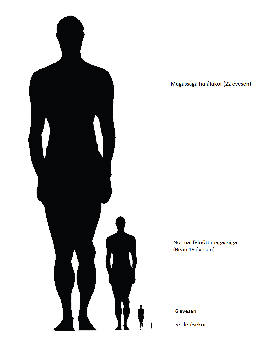 Julian „Bean” Delphiki magassága.